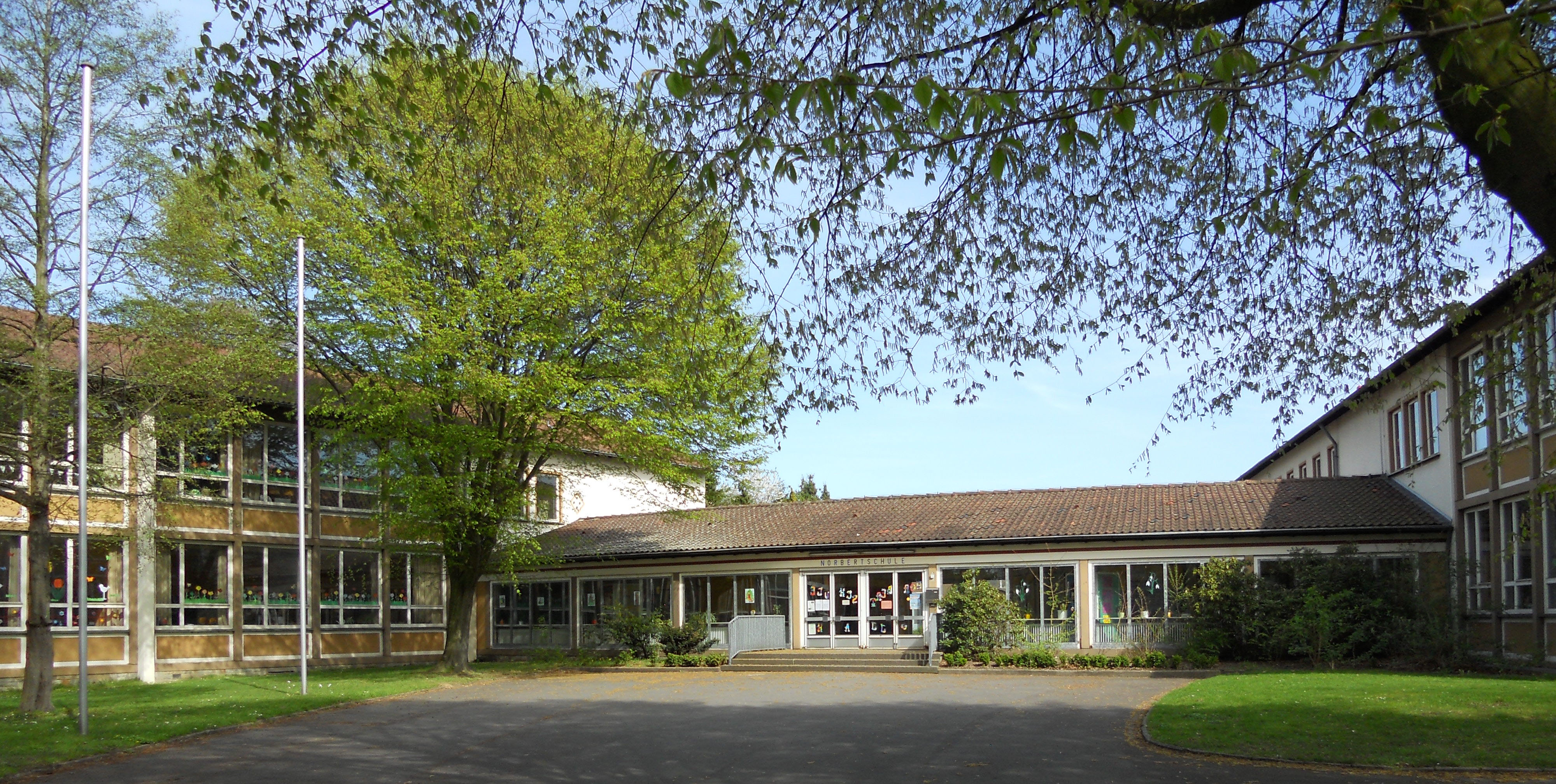 Ehemalige englische und kanadische Schule, heute St.-Norbert-Schule, in Werl.